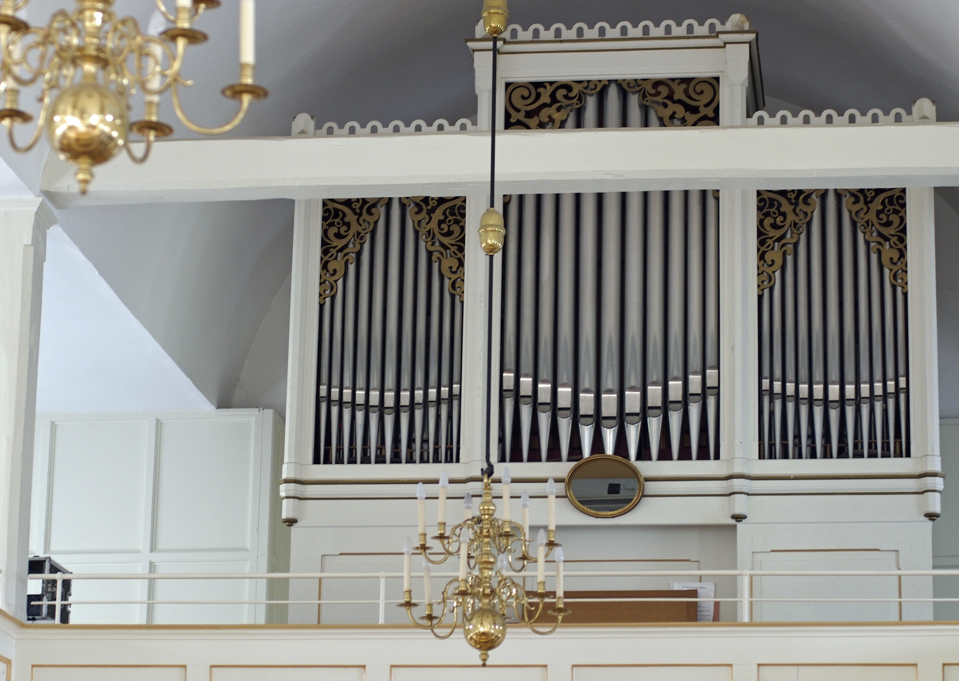 Orgel der Fabian-und-Sebastian-Kirche Sülze (Bergen)